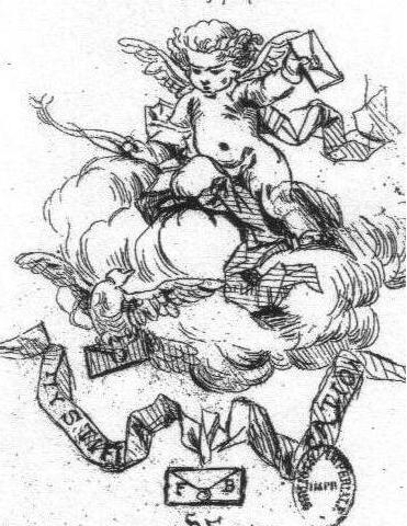 Photo d'une gravure